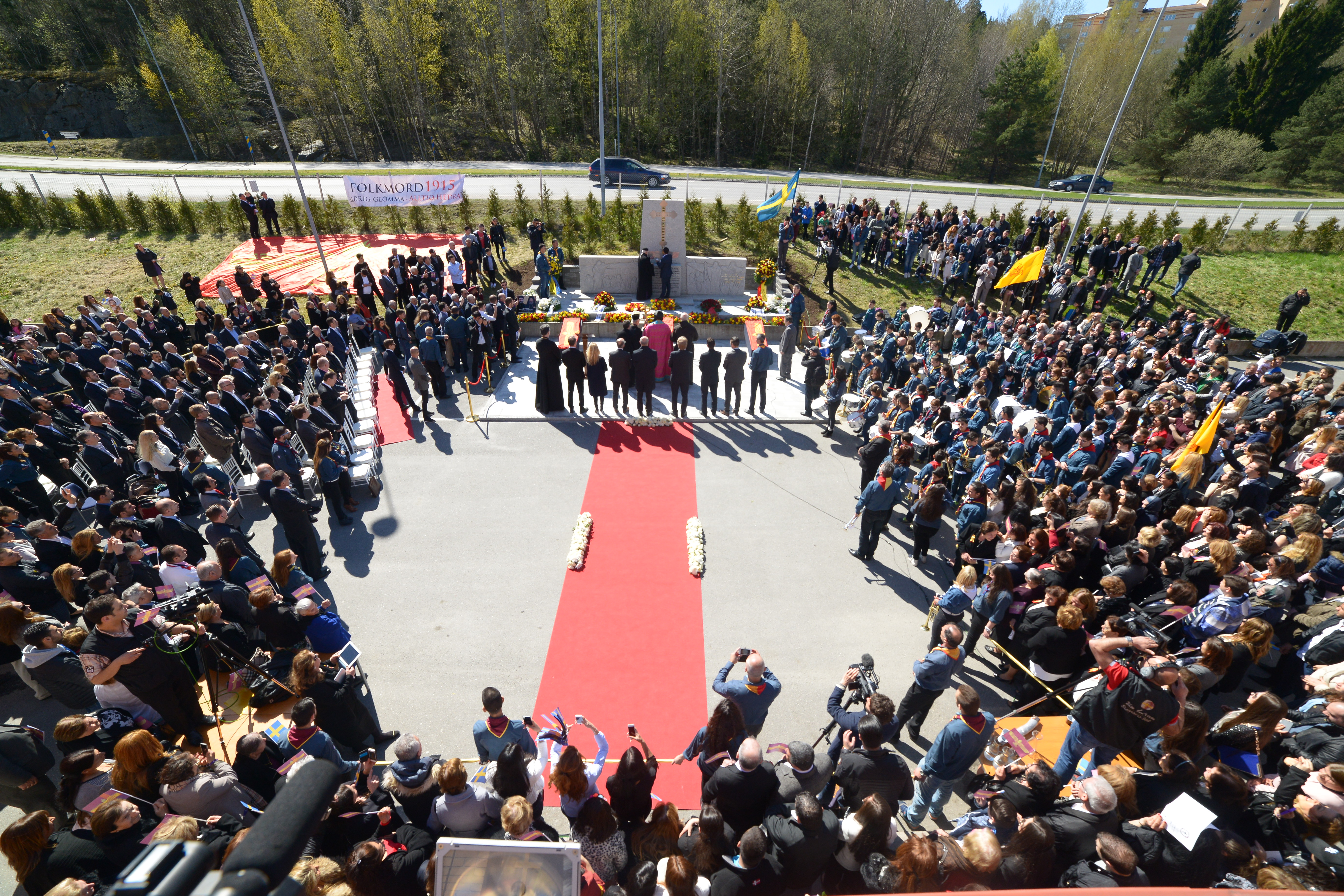 Syrianska folkmordet 1915 monument St Petrus och Paulus Syrisk Ortodoxa kyrkan i Botkyrka